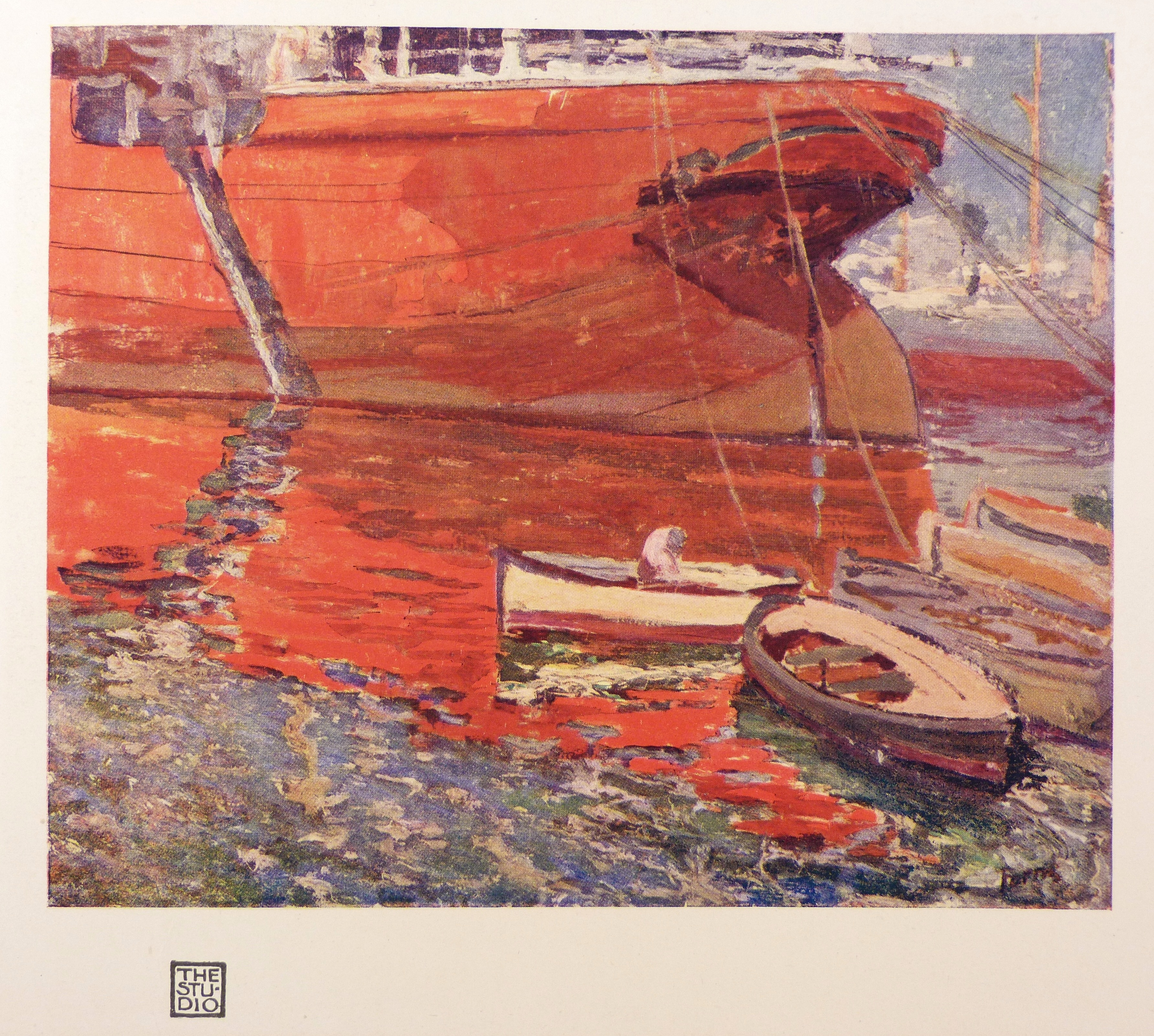 Reproducción en la revista THE STUDIO (númro del 14 de agosto de 1920) del cuadro al óleo "El barco rojo", de Rafael Forns y Romans